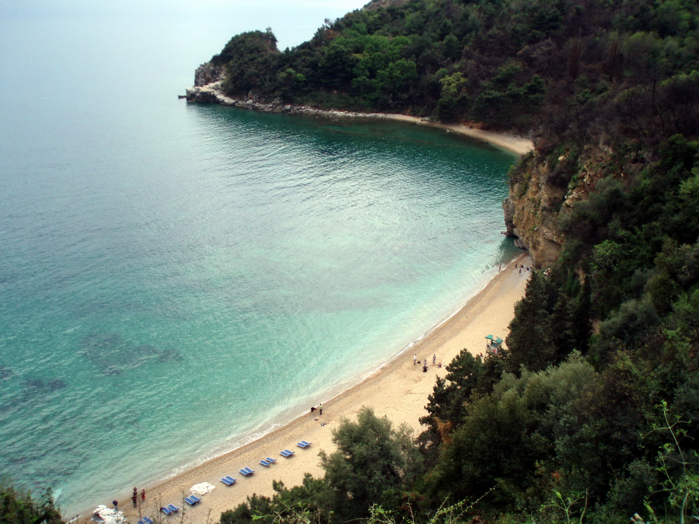 Mogren beach